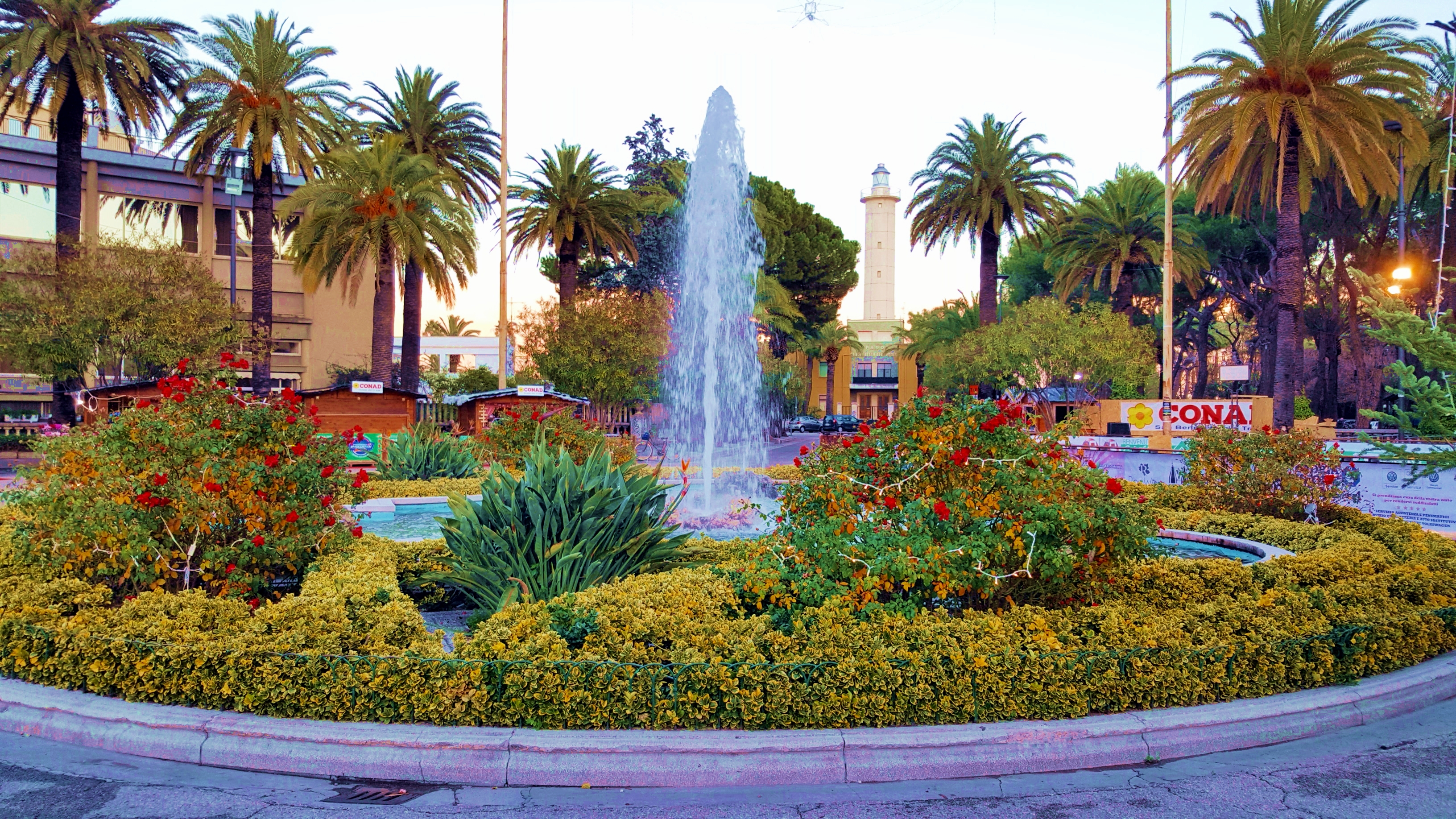 San Benedetto del Tronto, Piazza Carlo Giorgini e la sua fontana.